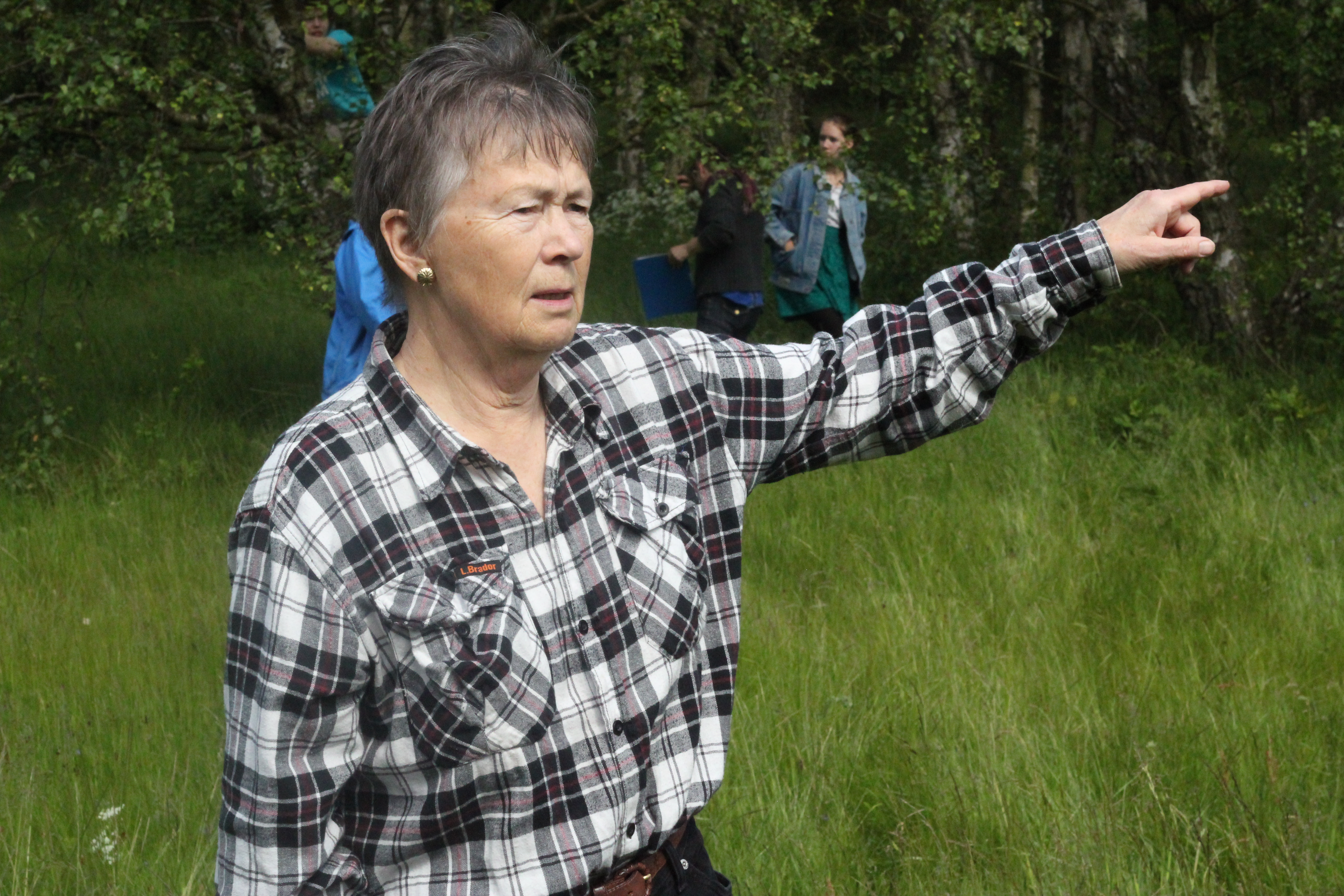 Regissör Martha Vestin. 2012